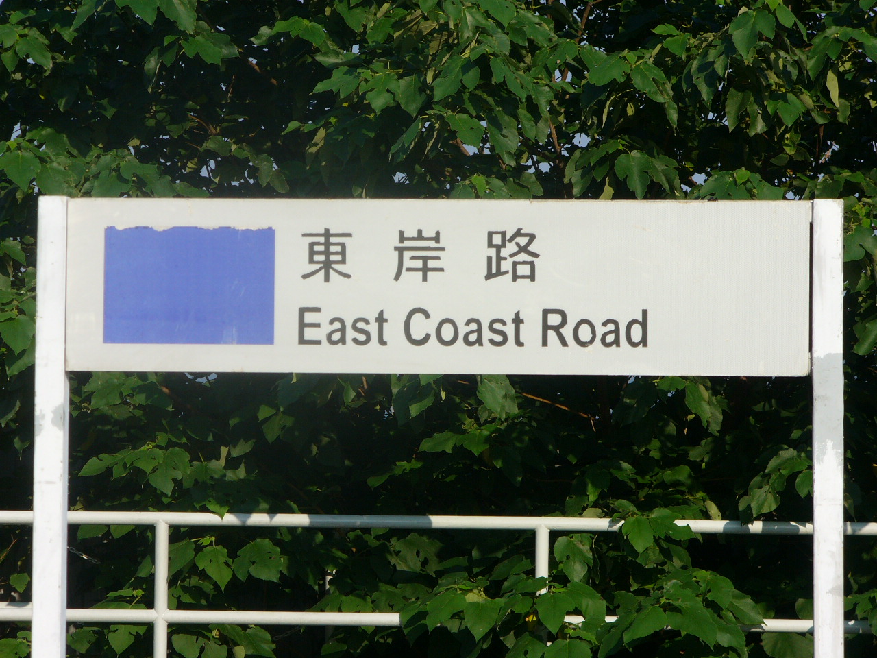 中文（香港）: 東岸路路牌